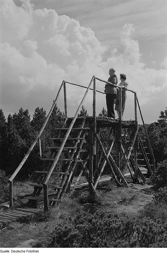 Original image description from the Deutsche Fotothek Zinnwald-Georgenfeld. Georgenfelder Hochmoor, Wanderer auf dem Aussichtsgerüst